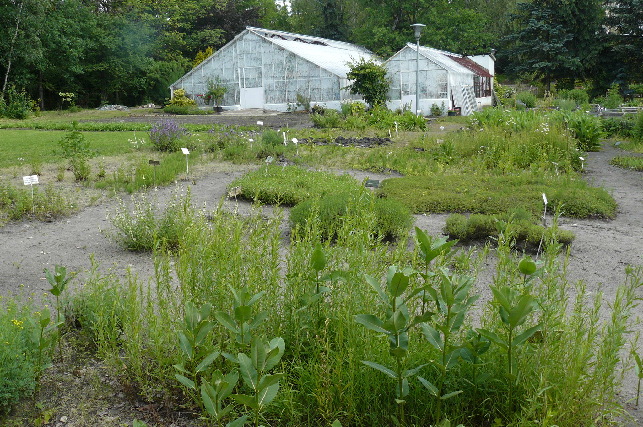 Zwiedzanie Ogrodu Farmakognostycznego Uniwersytetu Medycznego w Poznaniu, zorganizowane przez Katedrę Naturalnych Surowców Leczniczych i Kosmetycznych Uniwersytetu Medycznego w Poznaniu oraz Stowarzyszenie Absolwentów Uniwersytetu im. Adama Mickiewicza w Poznaniu. 2.6.2012r.